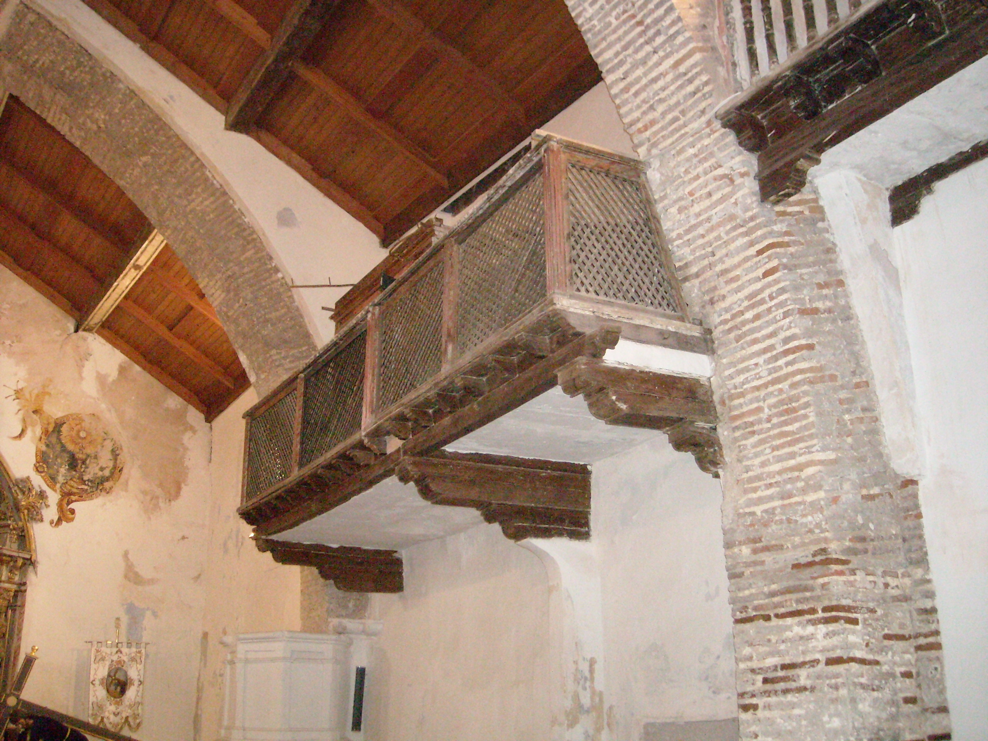 Interior de Santa Maria de Moya